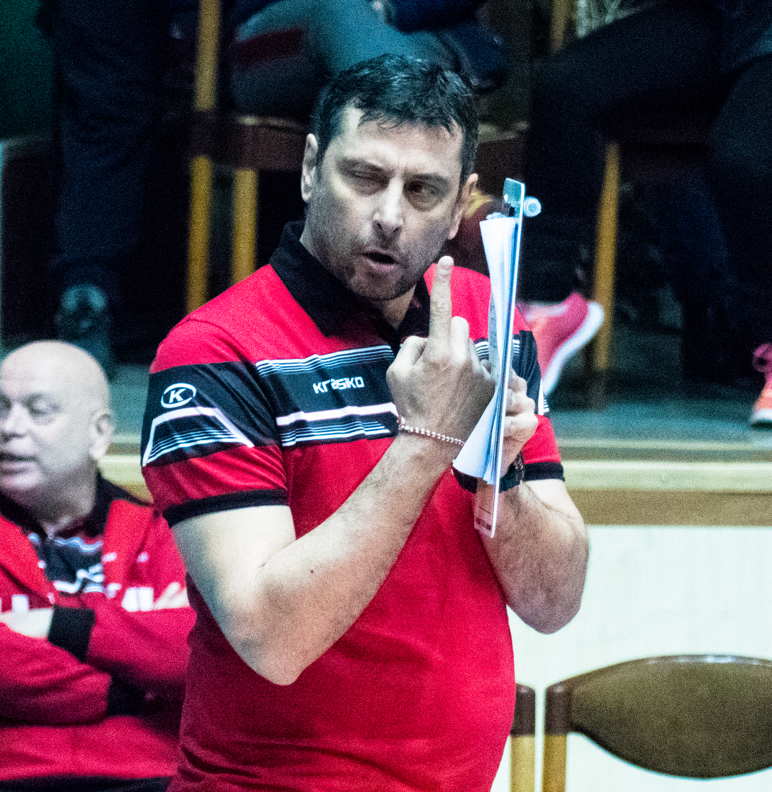 Старши-треньорът на Нефтохимик 2010